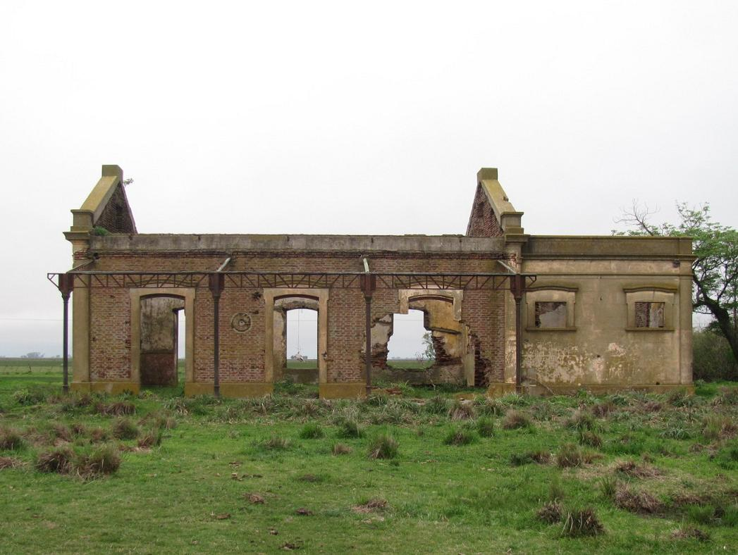 Estación Necol, provincia de Buenos Aires.